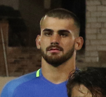 Riobamba, Ecuador, 18 enero 2017 (Andes).- El combinado ecuatoriano dirigido por Javier Rodríguez cayó 1-0 este miércoles ante Brasil en el marco de la primera jornada del Grupo A del Campeonato Sudamericano Sub 20 Ecuador 2017, durante el partido jugado en el estadio Olímpico de Riobamba (centro andino), abarrotado de hinchas. ANDES/Micaela Ayala V.